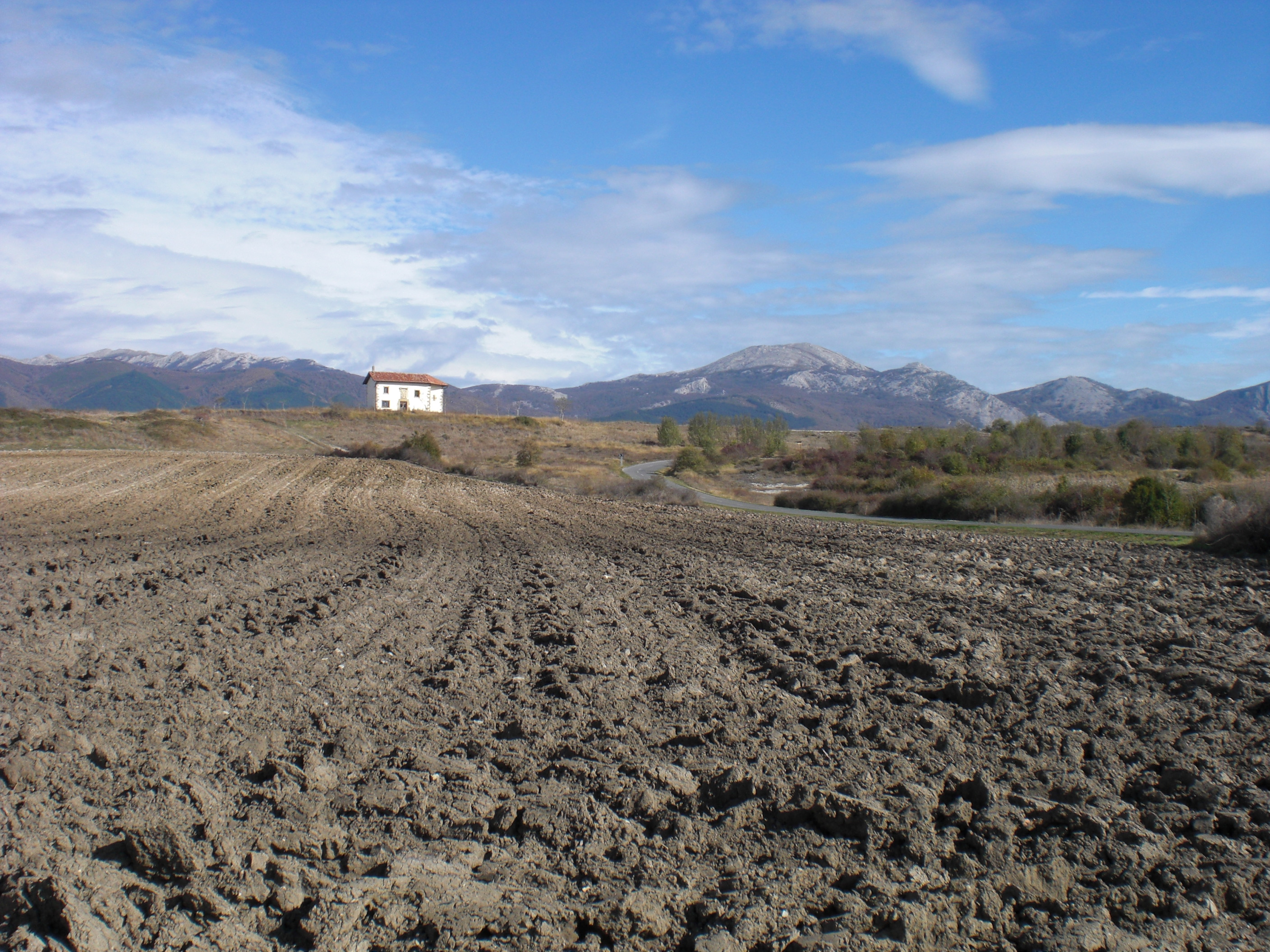 Erdoñako Donemiliaga baseliza. Eskuinean, Aratz mendia.